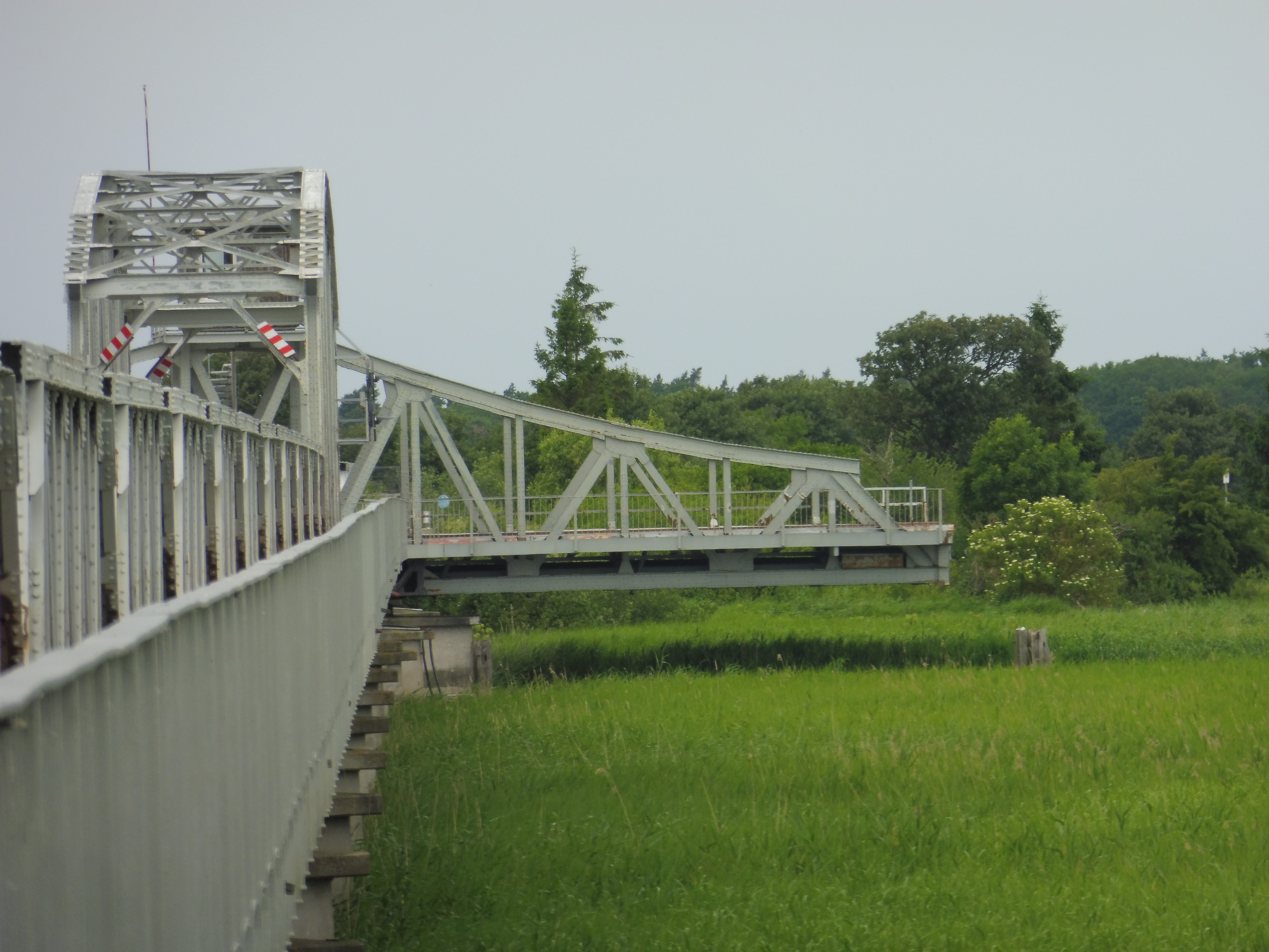 Geöffnete Meiningenbrücke (Ostseite)